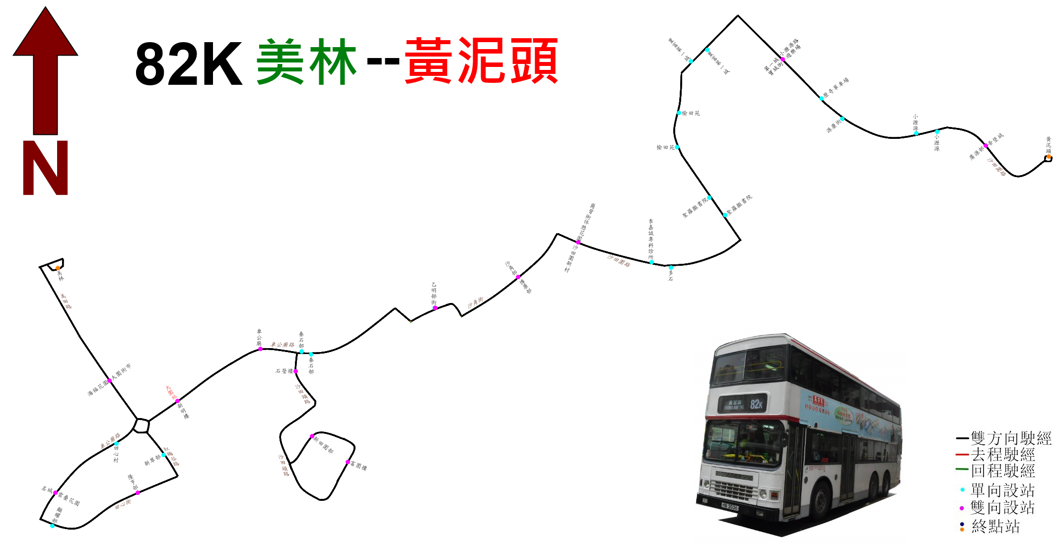 中文（香港）: 九巴82K線的走線圖